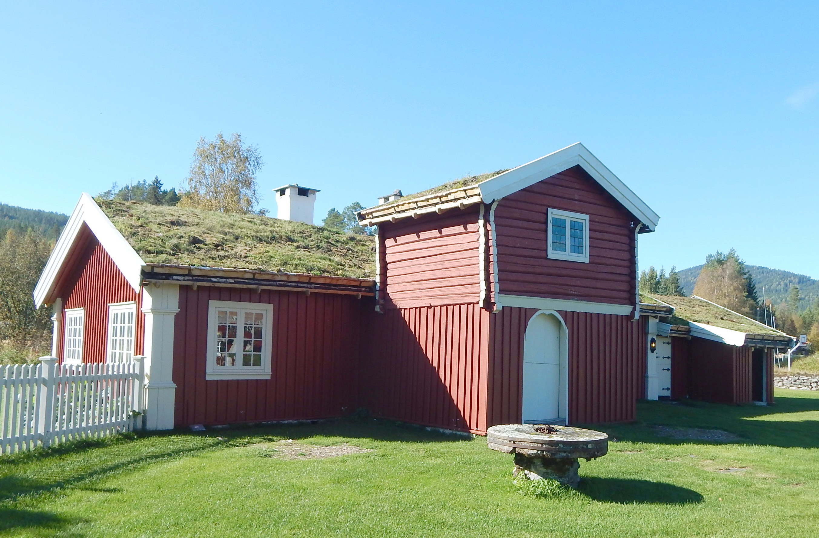 Barfrøstue fra Trønnes Nordre ved tunet på Nordstumoen (Midt-Østerdal VGS) utenfor Koppang